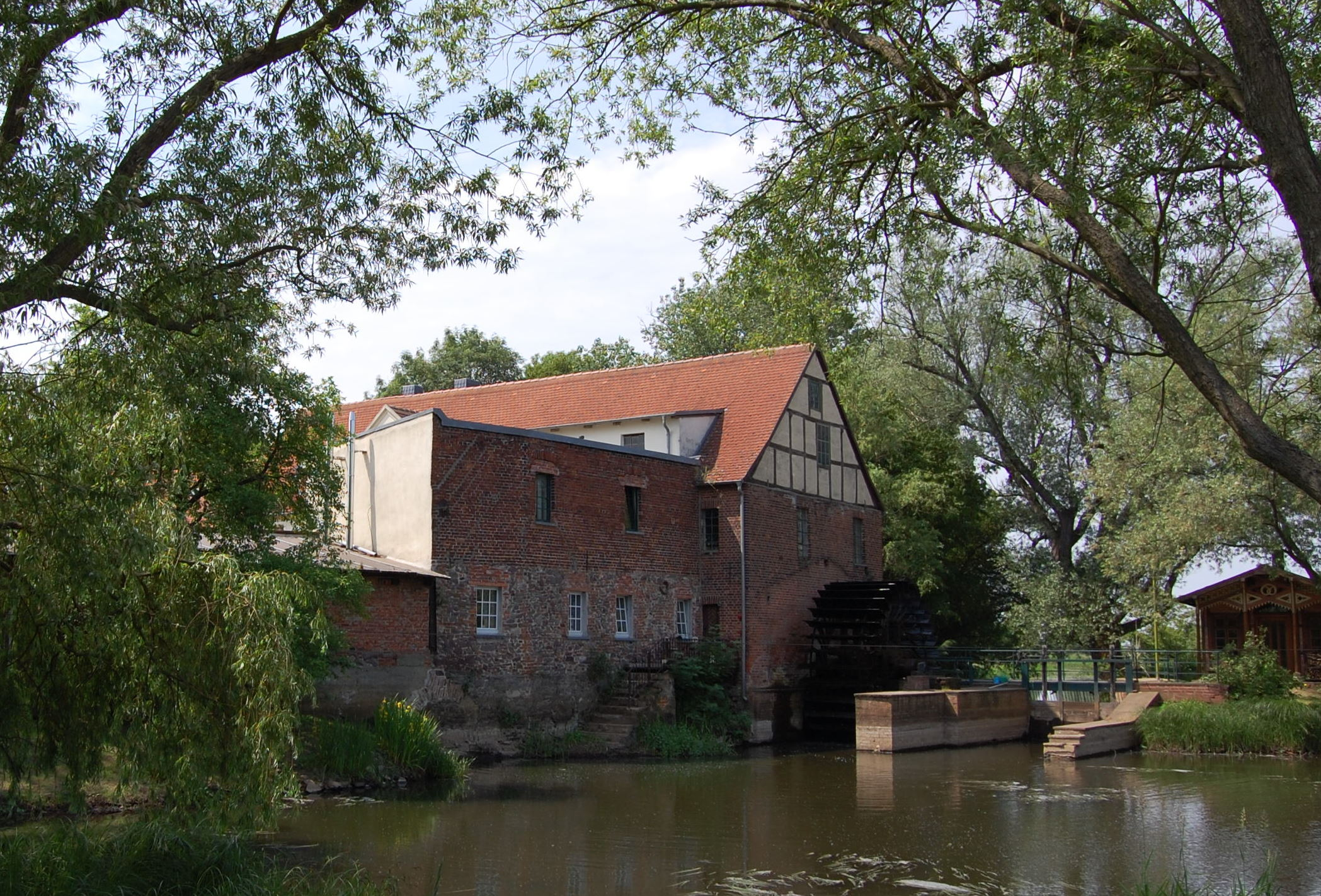 Mühlrad der Vordermühle Elbeu